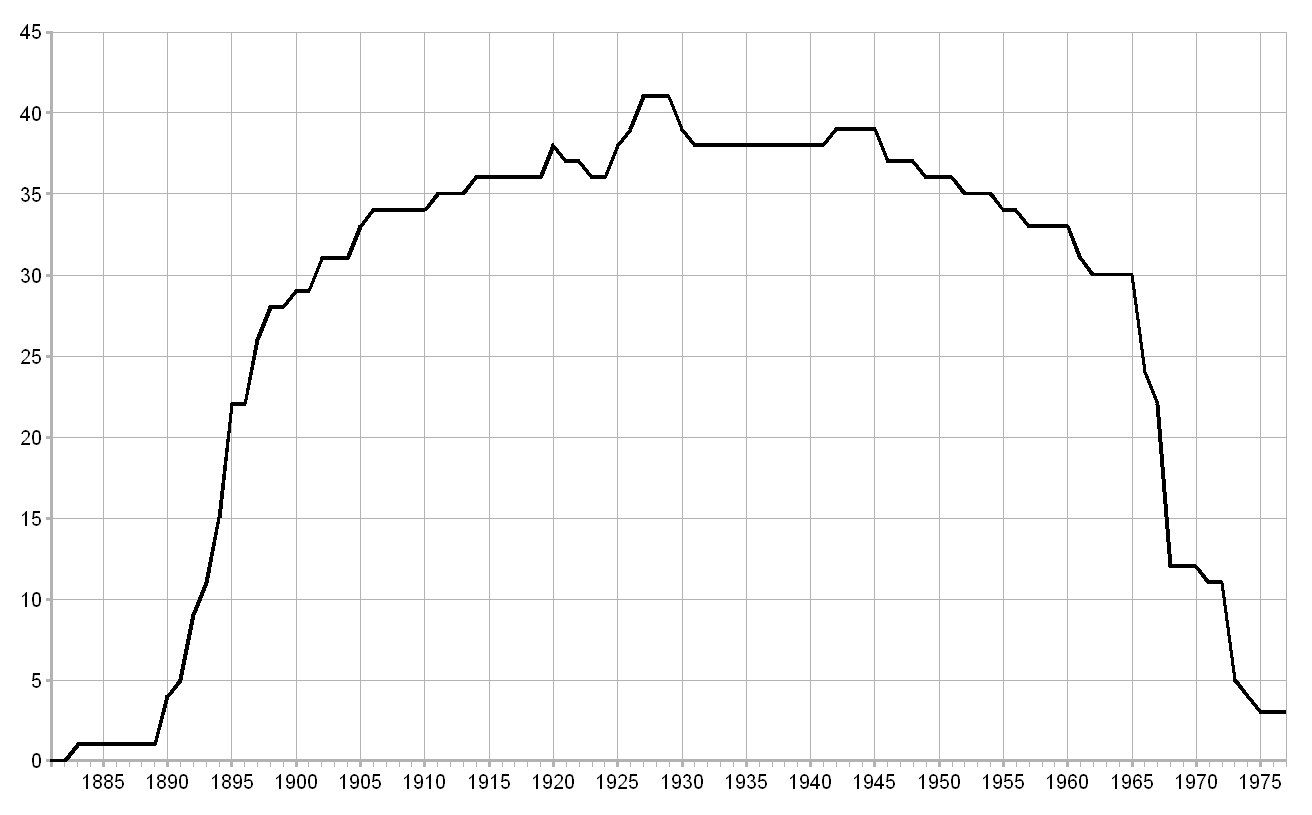 Statistik der Anschlussbahnen der Schmalspurbahn Wilkau-Haßlau–Carlsfeld